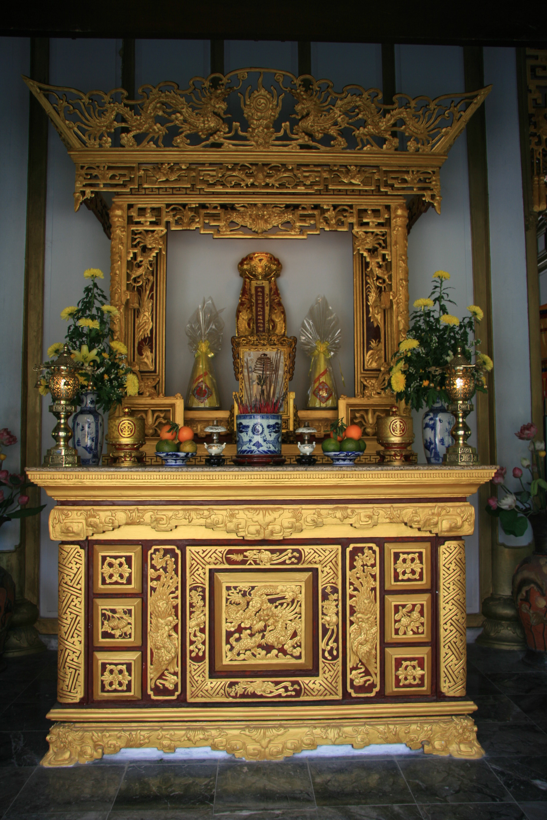 Bàn thờ Đoàn Nhữ Hài tại Trung tâm văn hoá Huyền Trân, Huế.